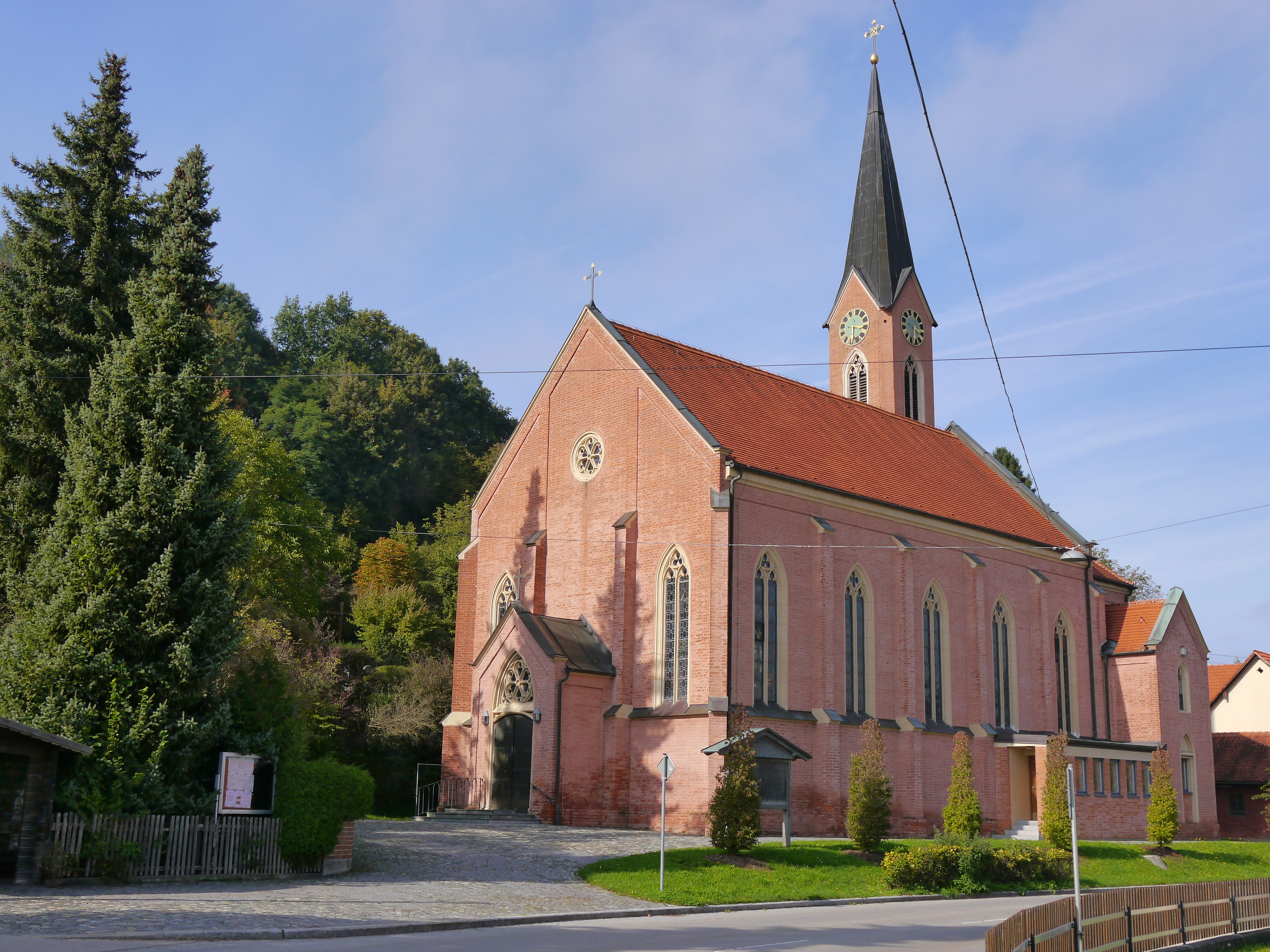 Katholische Pfarrkirche Mariae HimmelfahrtThis is a photograph of an architectural monument.